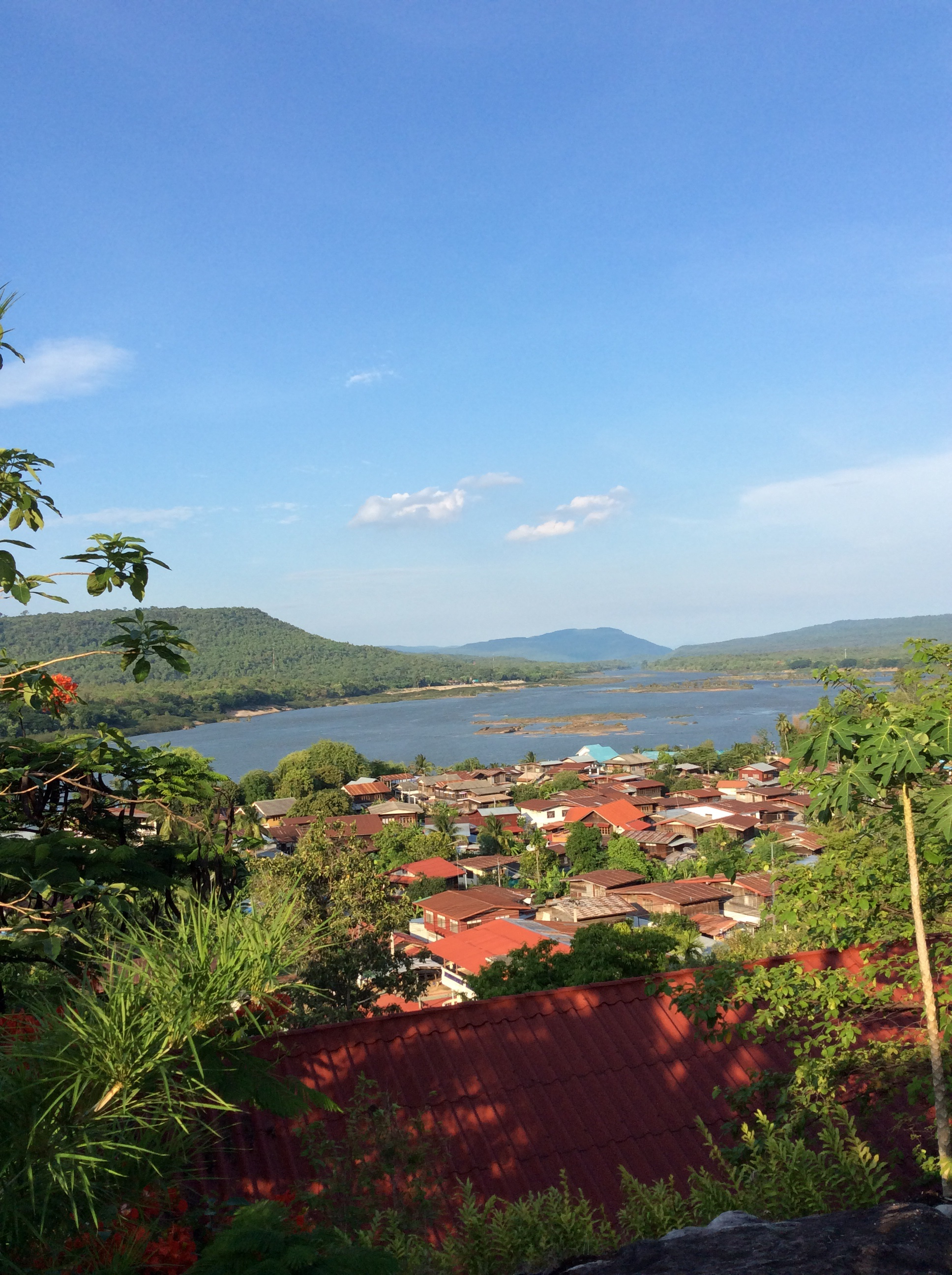 โขงเจียม ตำบล โขงเจียม จังหวัด อุบลราชธานี ประเทศไทย